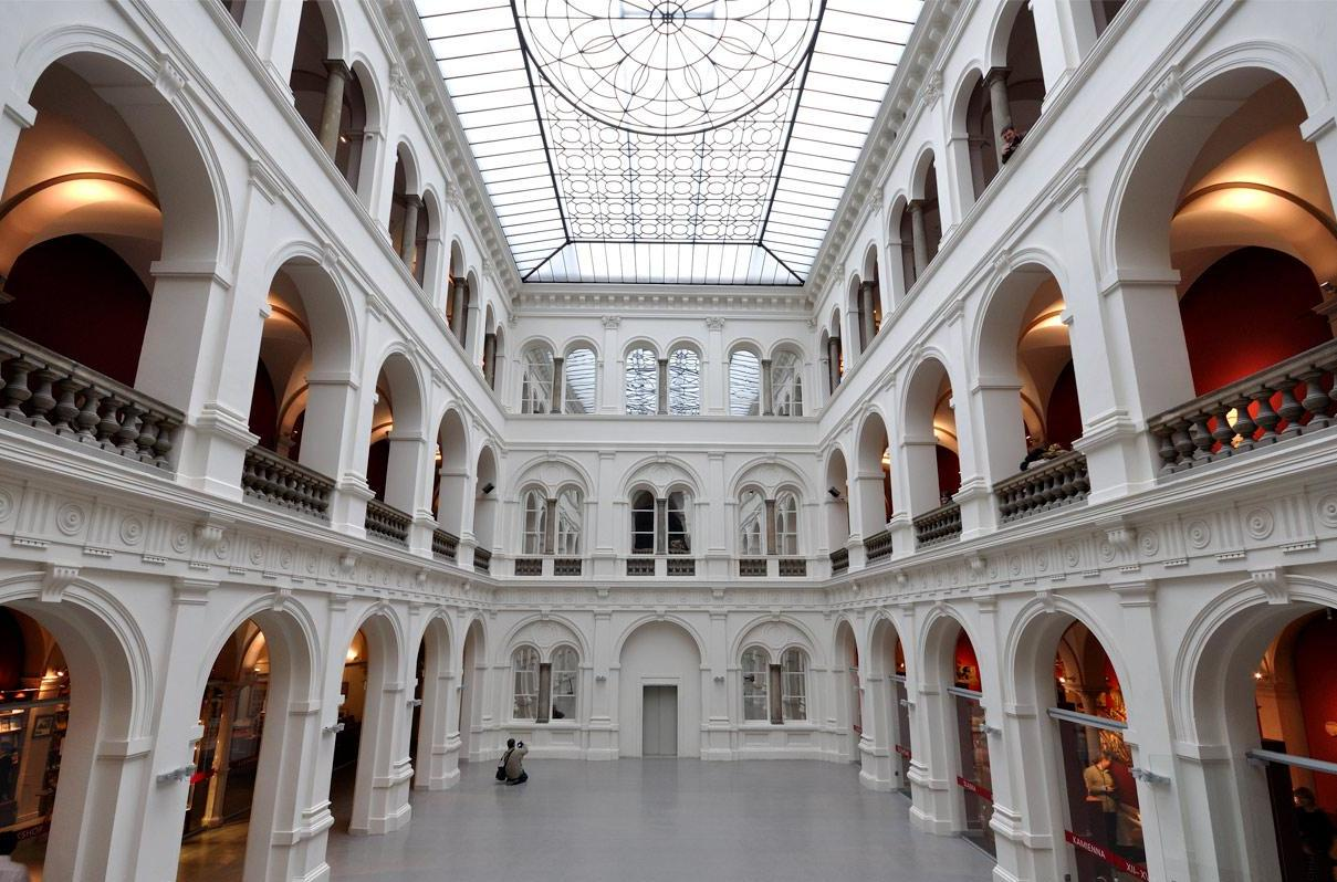 Piękne patio.